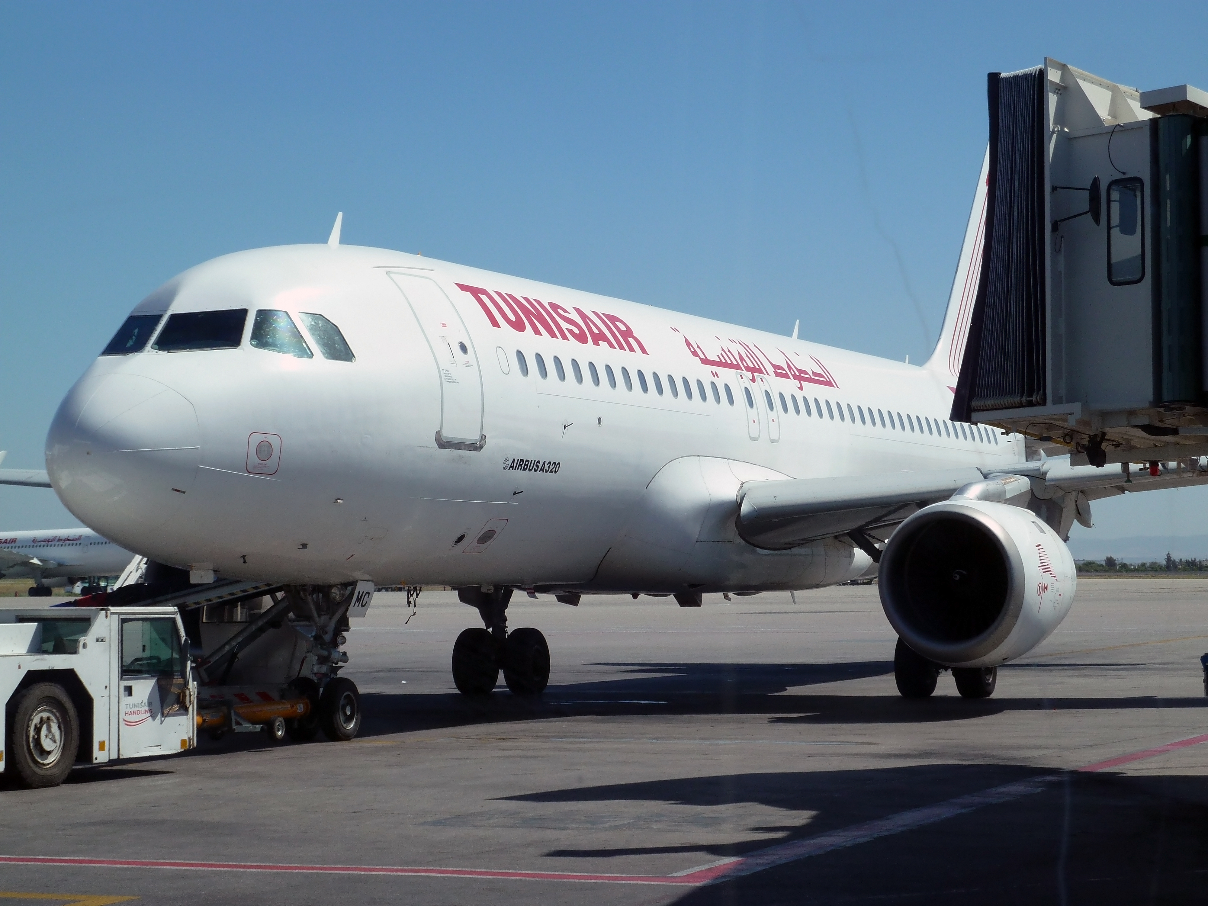 L'avion TS-IMC de Tunisair qui s"appellait '7 Novembre' avant le 14 janivier. Le nom est effacé et n'a pas été remplacé !!